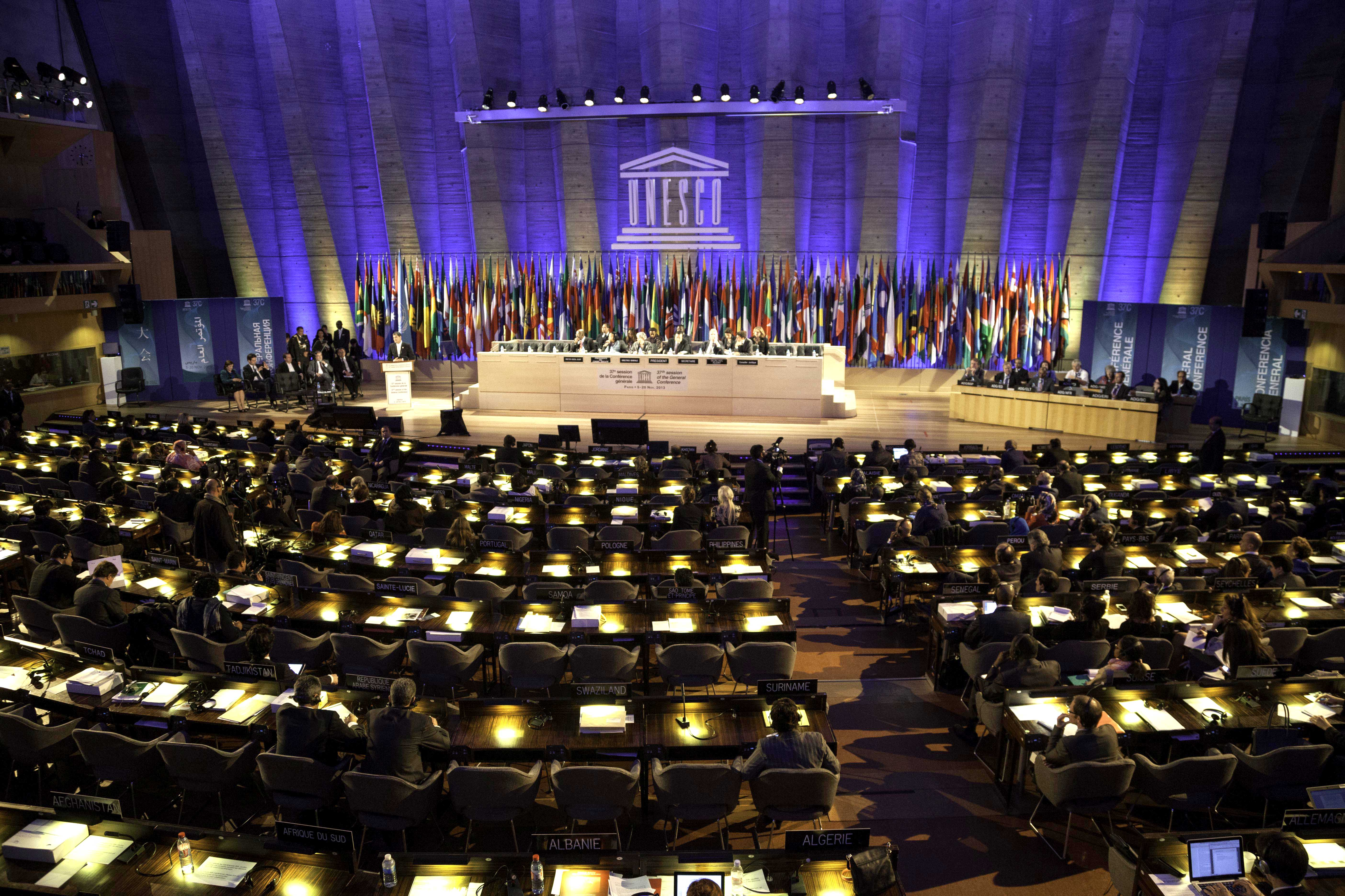 Paris (Francia), 07 de noviembre 2013. El Presidente del Ecuador, Rafael Correa, ofreció un discurso en el pleno de la "37 Asamblea General de la UNESCO". Foto: Fernanda LeMarie - Cancillería del Ecuador.